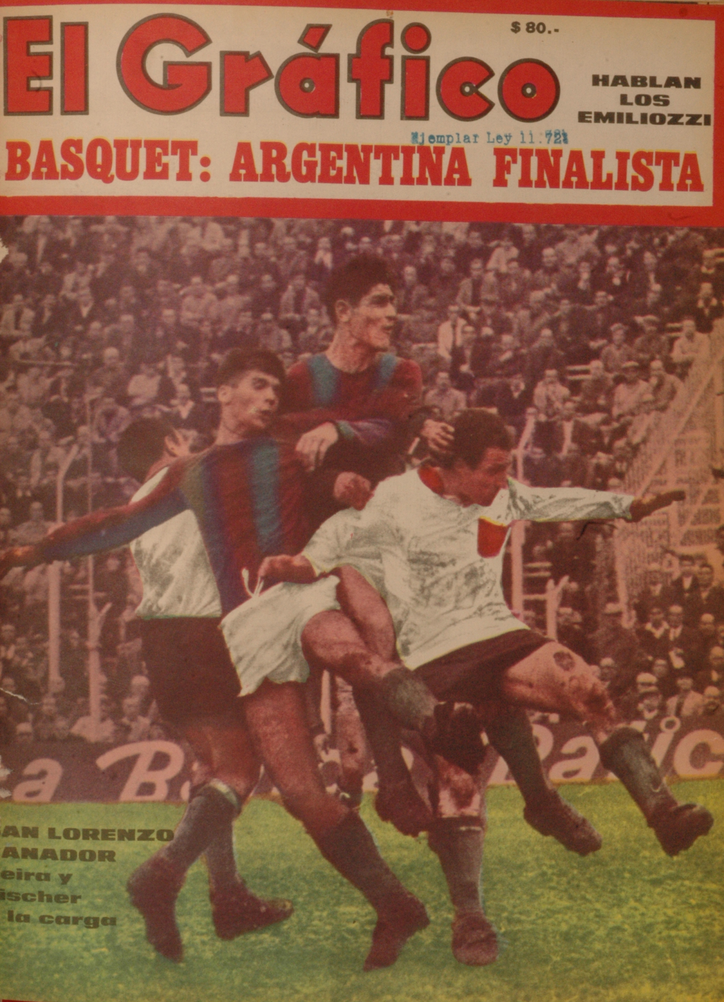 El Grafico del 30 de Mayo de 1967. Edicion 2486